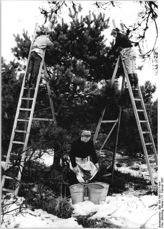 Finsterwalde, Zapfenpflücker, Zapfenernte ADN-ZB Weisflog 17.2.1987 Bez. Cottbus: "Nachwuchs" künftiger Wälder - In den Forstrevieren der Republik ist die Saatgutgewinnung von Kiefern, Lärchen und Erlen in vollem Gange. Zu den ältesten und ertragreichsten Plantagen zur Zapfenernte gehört die Anlage Babben im Kreis Finsterwalde. Im Vorjahr wurde mit einem Ertrag von 73 Dezitonnen der Bedarf an genetisch wertvollem Saatgut im gesamten Staatlichen Forstwirtschaftsbetrieb Finsterwalde gedeckt. Für die Aufforstung in der DDR sind jährlich allein 6.000 Kilogramm Kiefernsamen erforderlich. Forstleute und Hlefer stellen dafür 3 750 Dezitonnen Zapfen bereit. ein Sechstel des Aufkommens stammt aus Plantagen. - siehe auch 1987-0217-3N